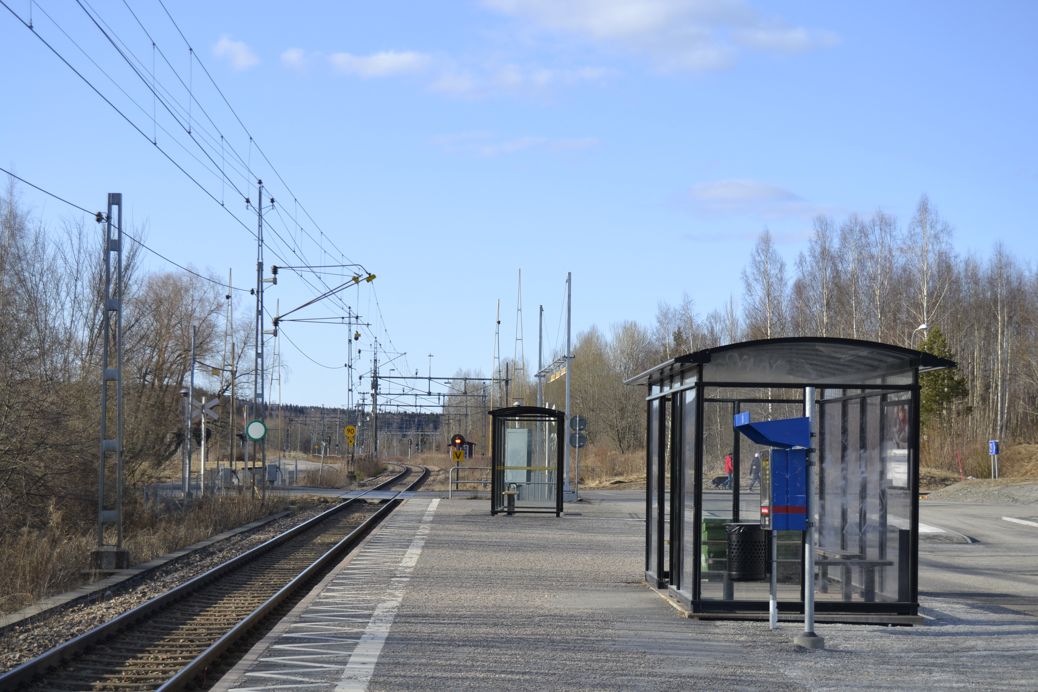 Storå station i nordlig riktning